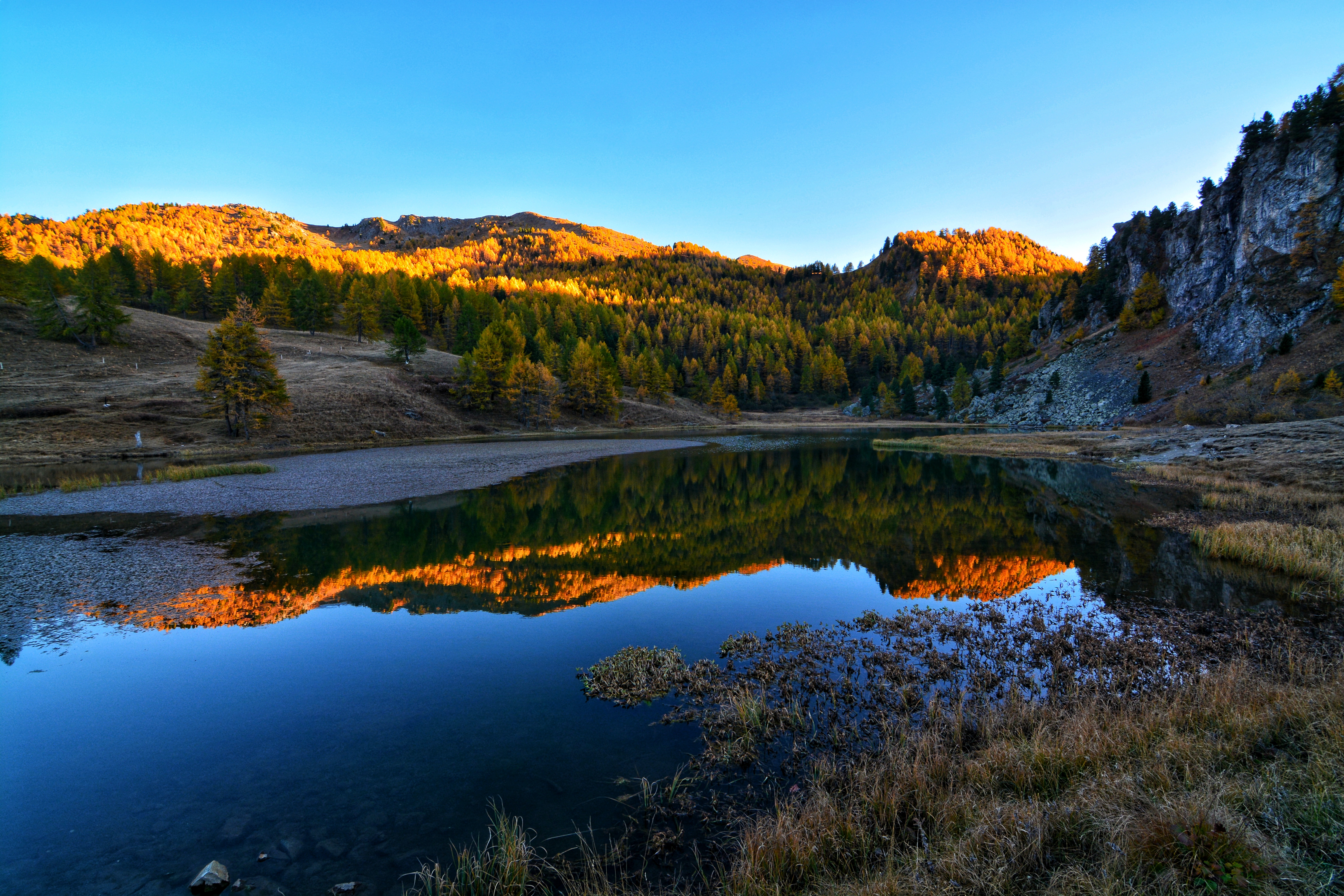 Cima Fournier e Lago Nero (Q49964171)